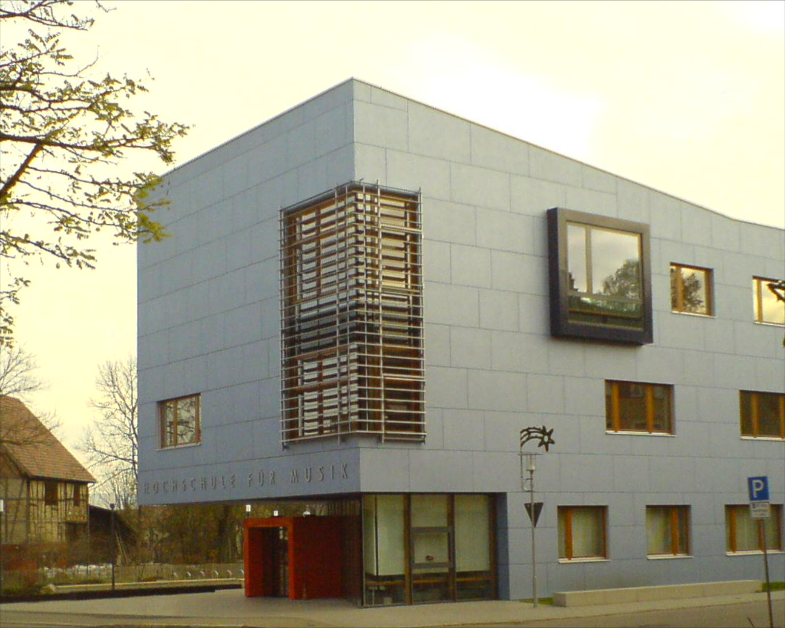 Blick von der Trossinger Hauptstraße zur Musikhochschule, 27.11.2006.